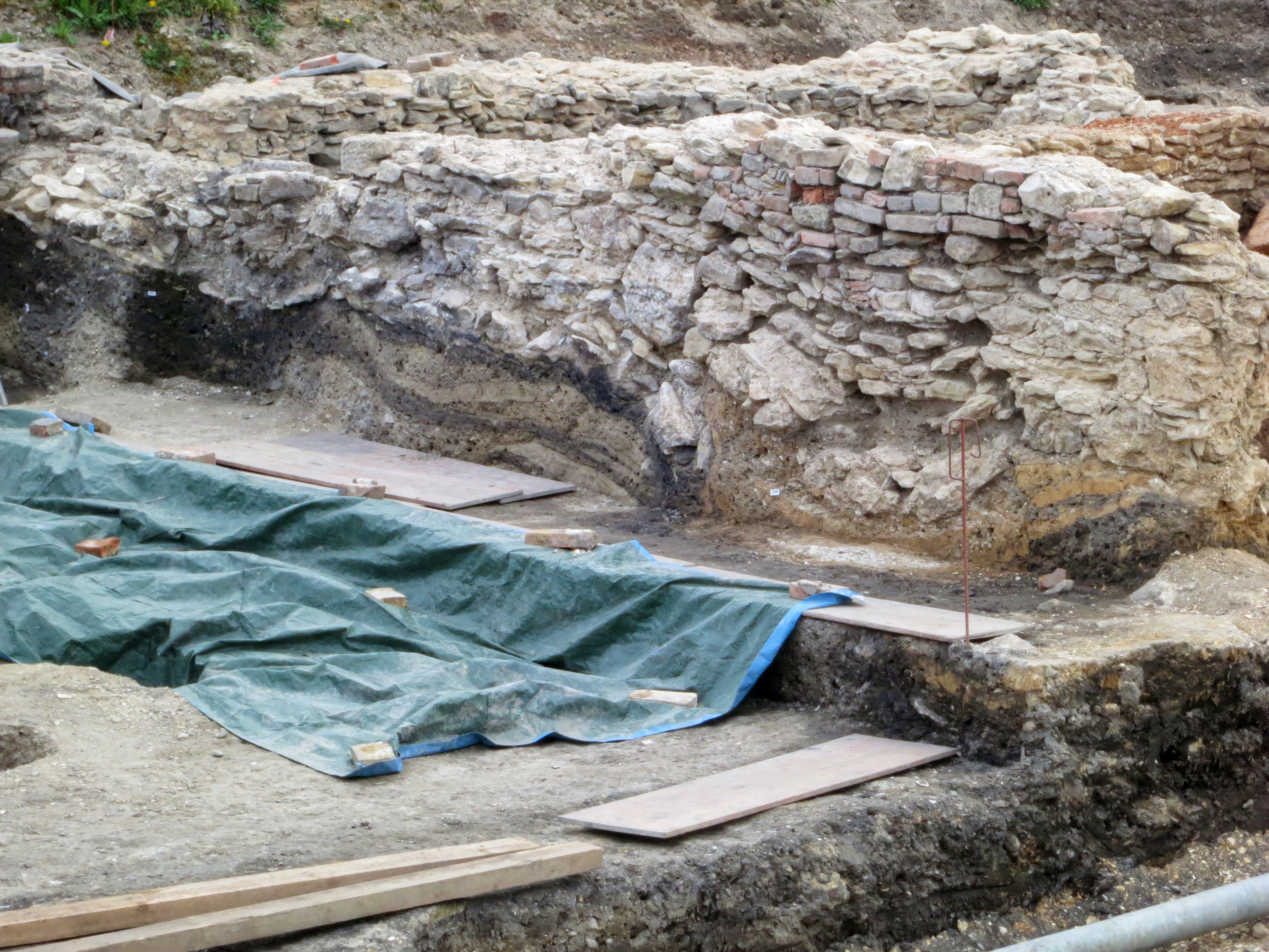 Auf dem Donaumarkt werden die Fundamente vor Baubeginn des Museum d. Bay. Geschichte gesichtet.